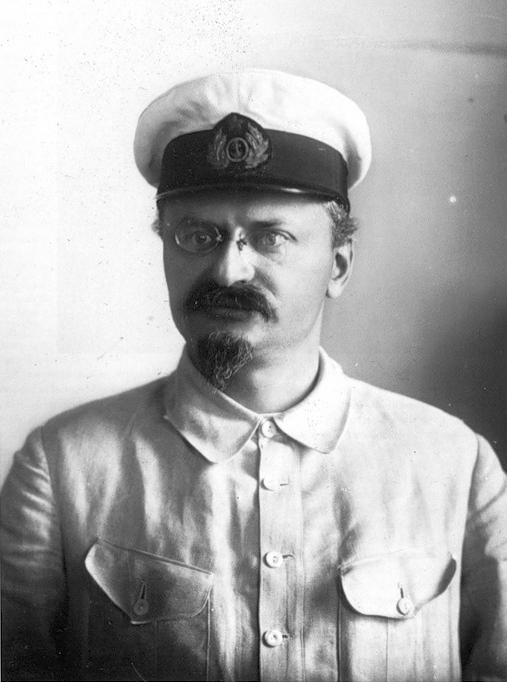 Троцкий в фуражке военмора